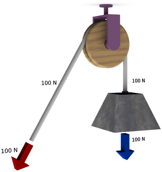 Ilustración de una polea simple fija.